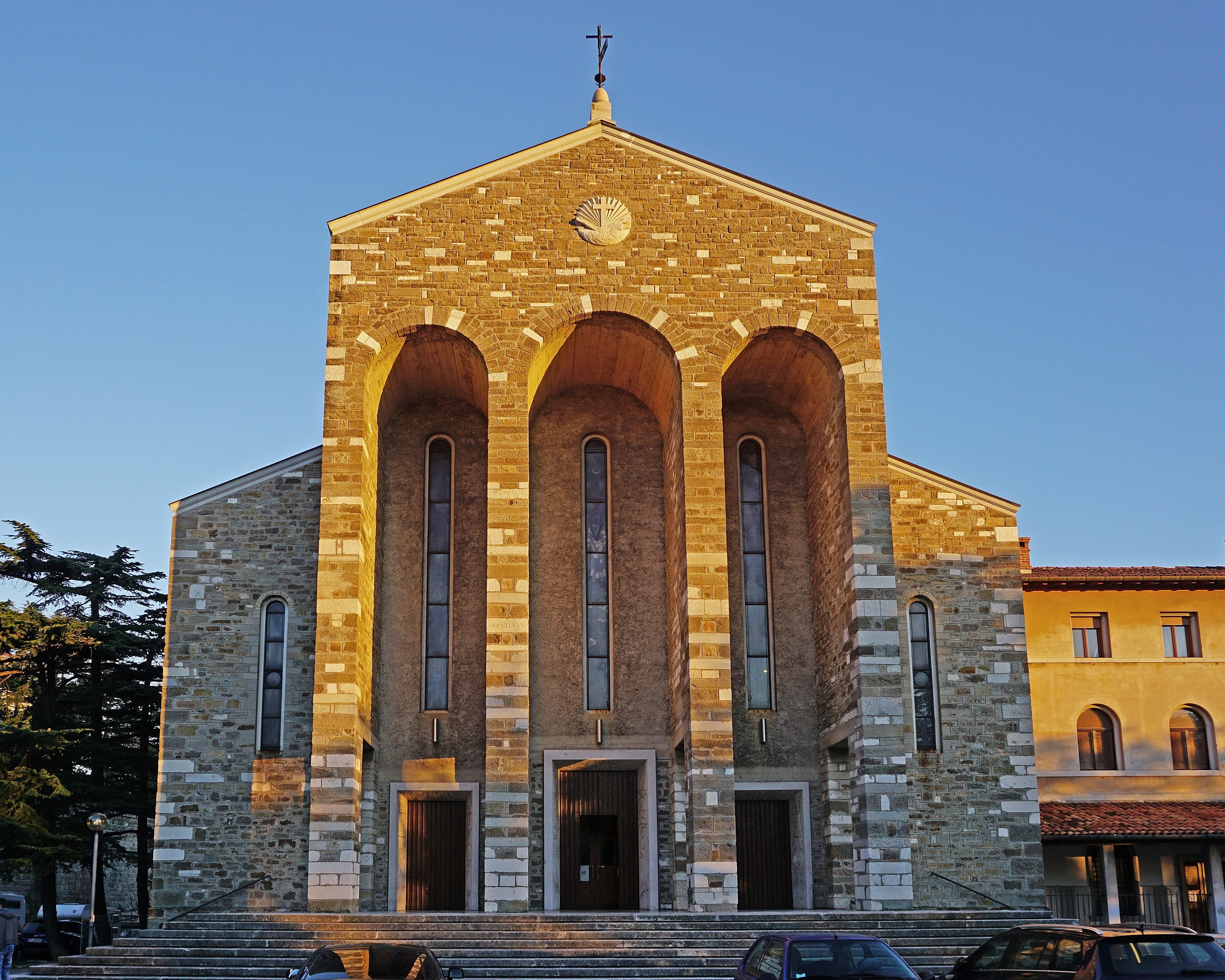 Westansicht der röm.-kath. Pfarrkirche Madonna del Mare in Triest